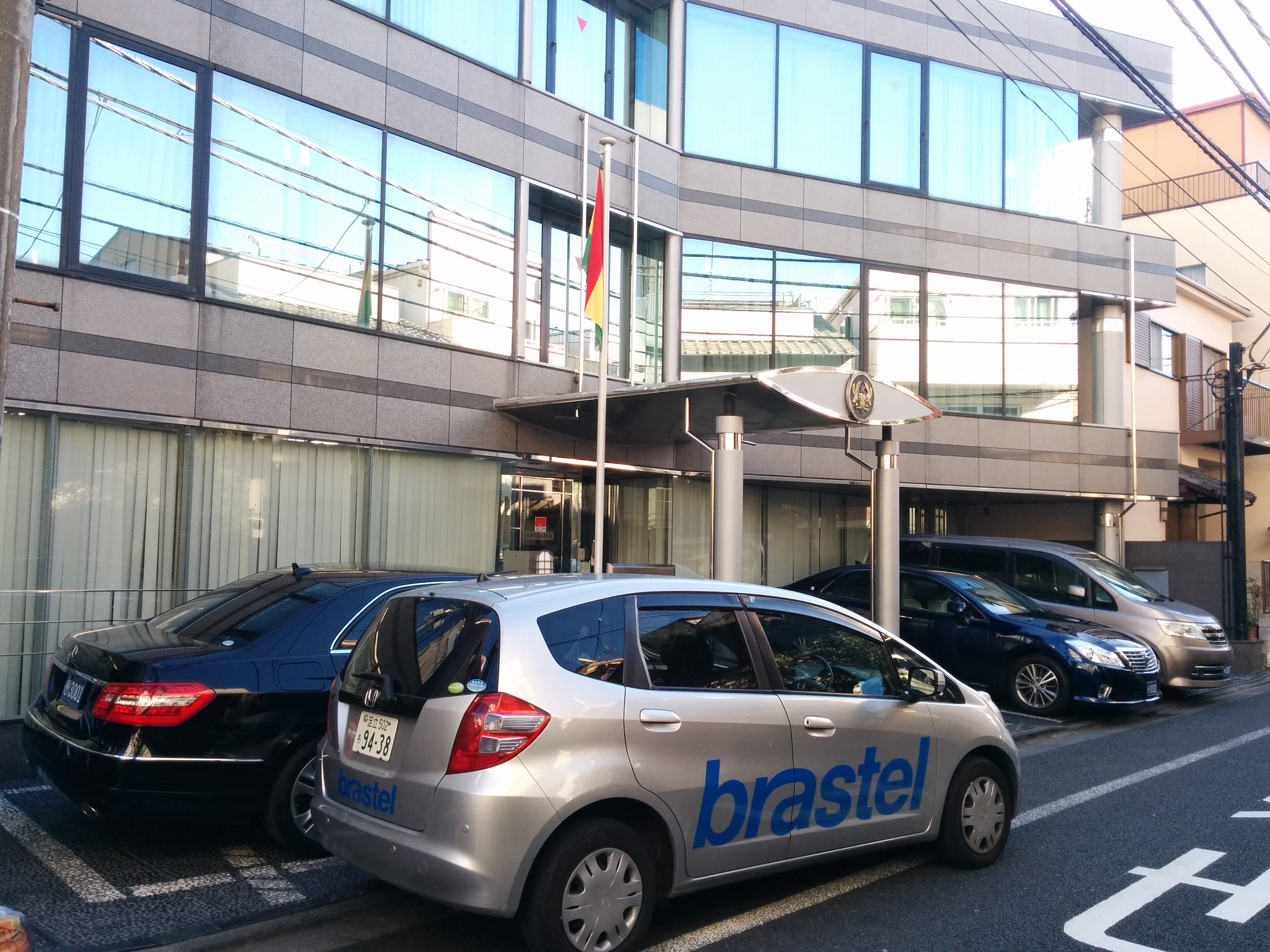 "parked"